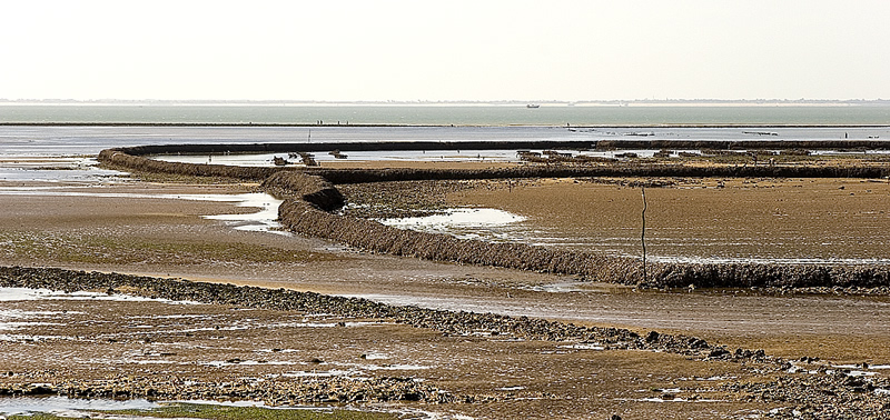 Écluses à poissons à Sainte-Marie-de-Ré - Île de Ré - Charente Maritime - France